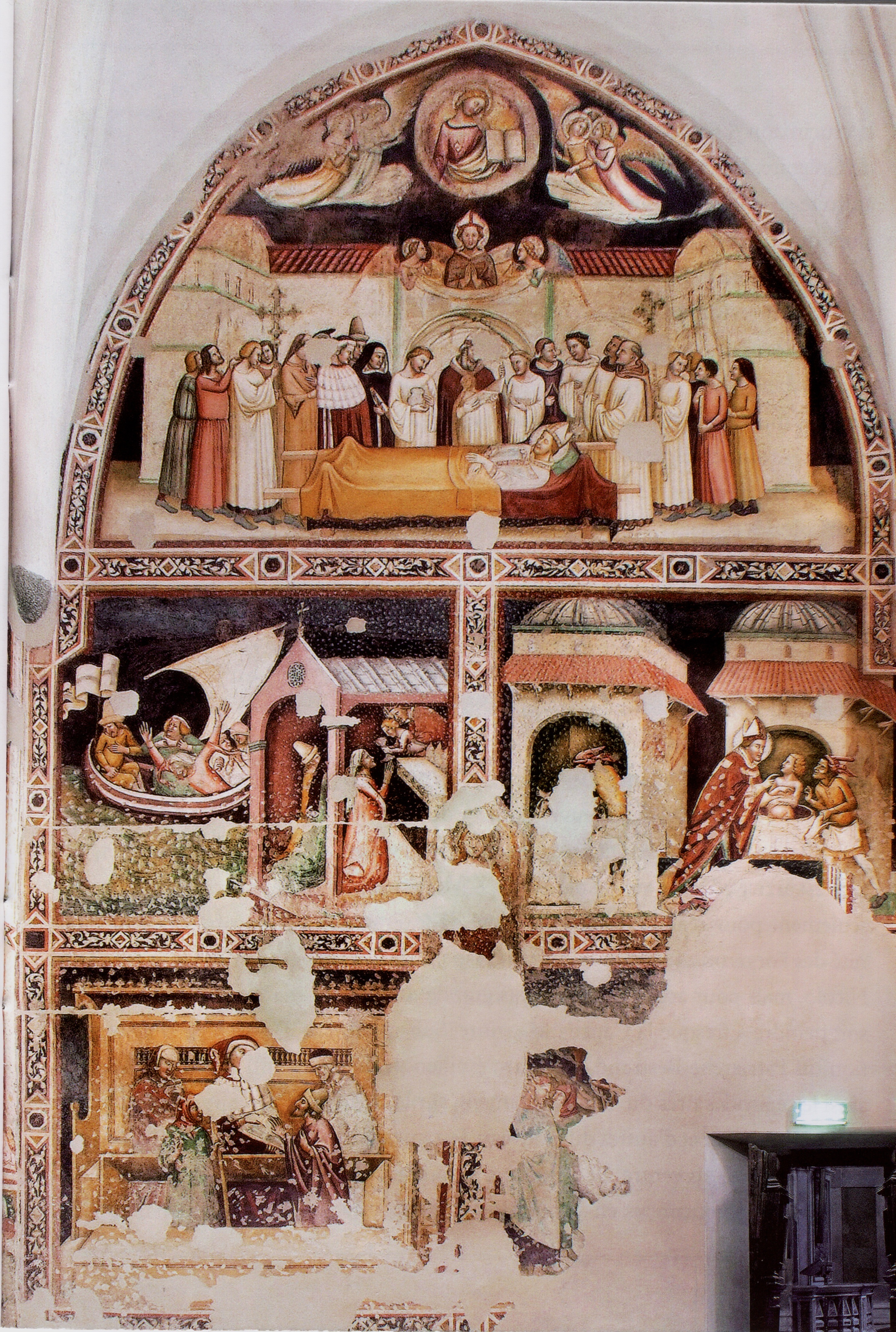 Vitale da Bologna - Storie San Nicolò - Museo del Duomo di Udine